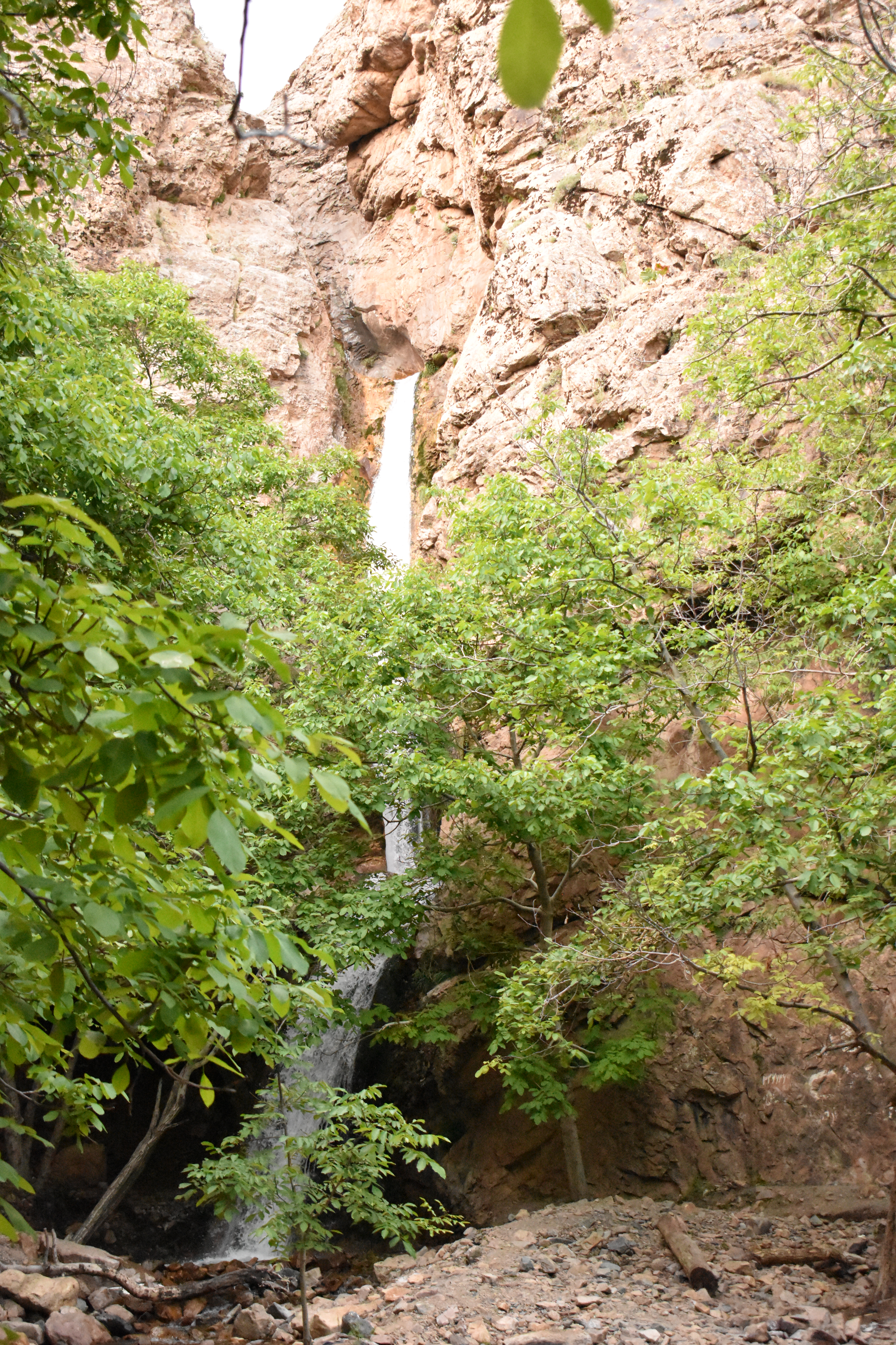 آبشار رودخانه کوچک در شهر خرو زبرخان- عکاس: محمد محمدی